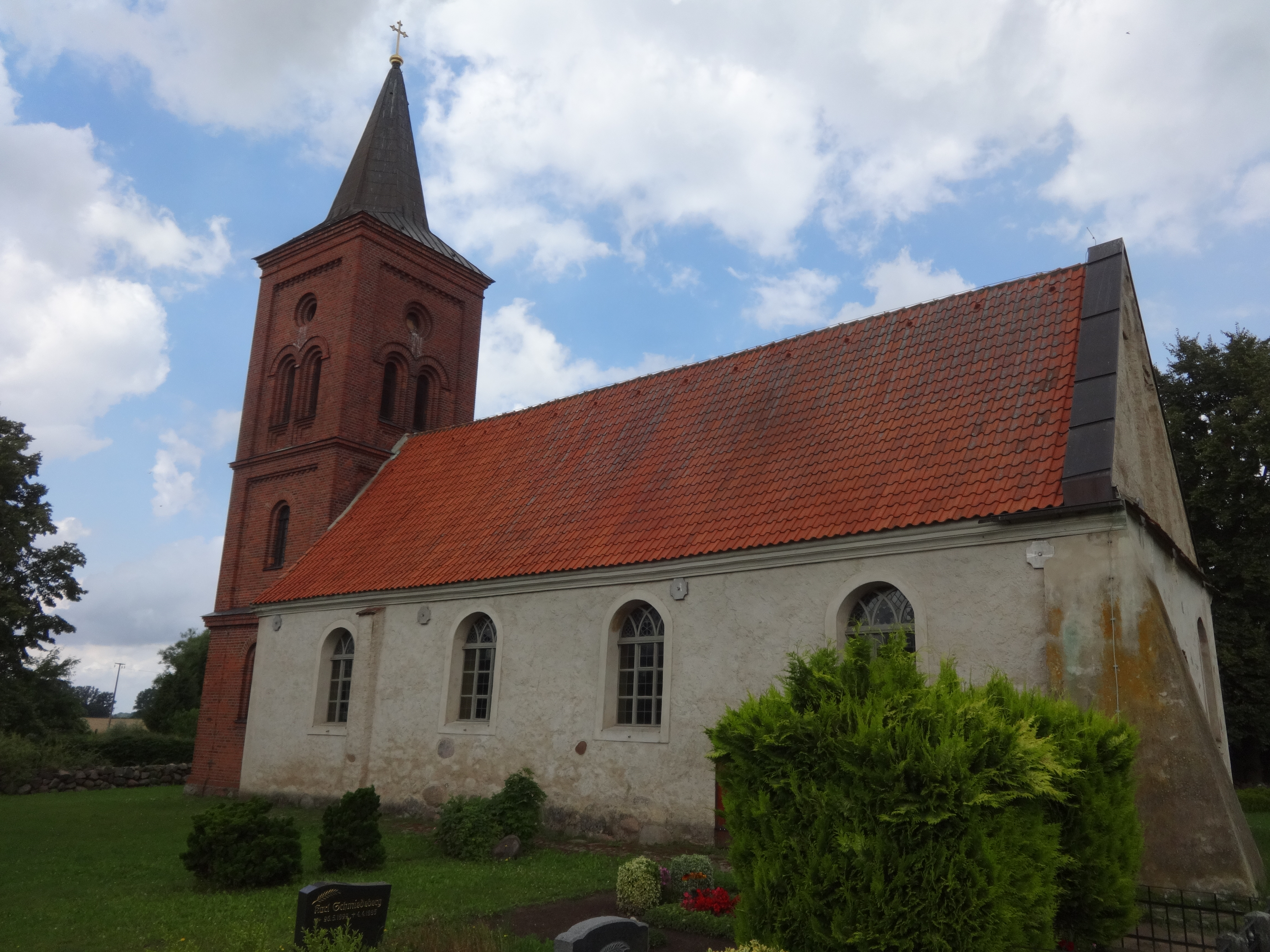 Kirche Alt Kosenow, auch Marienkirche und St.-Marien-Kirche genannt, ein aus dem 14. Jahrhundert stammendes Kirchengebäude im Ortsteil Alt Kosenow der Gemeinde Neu Kosenow.